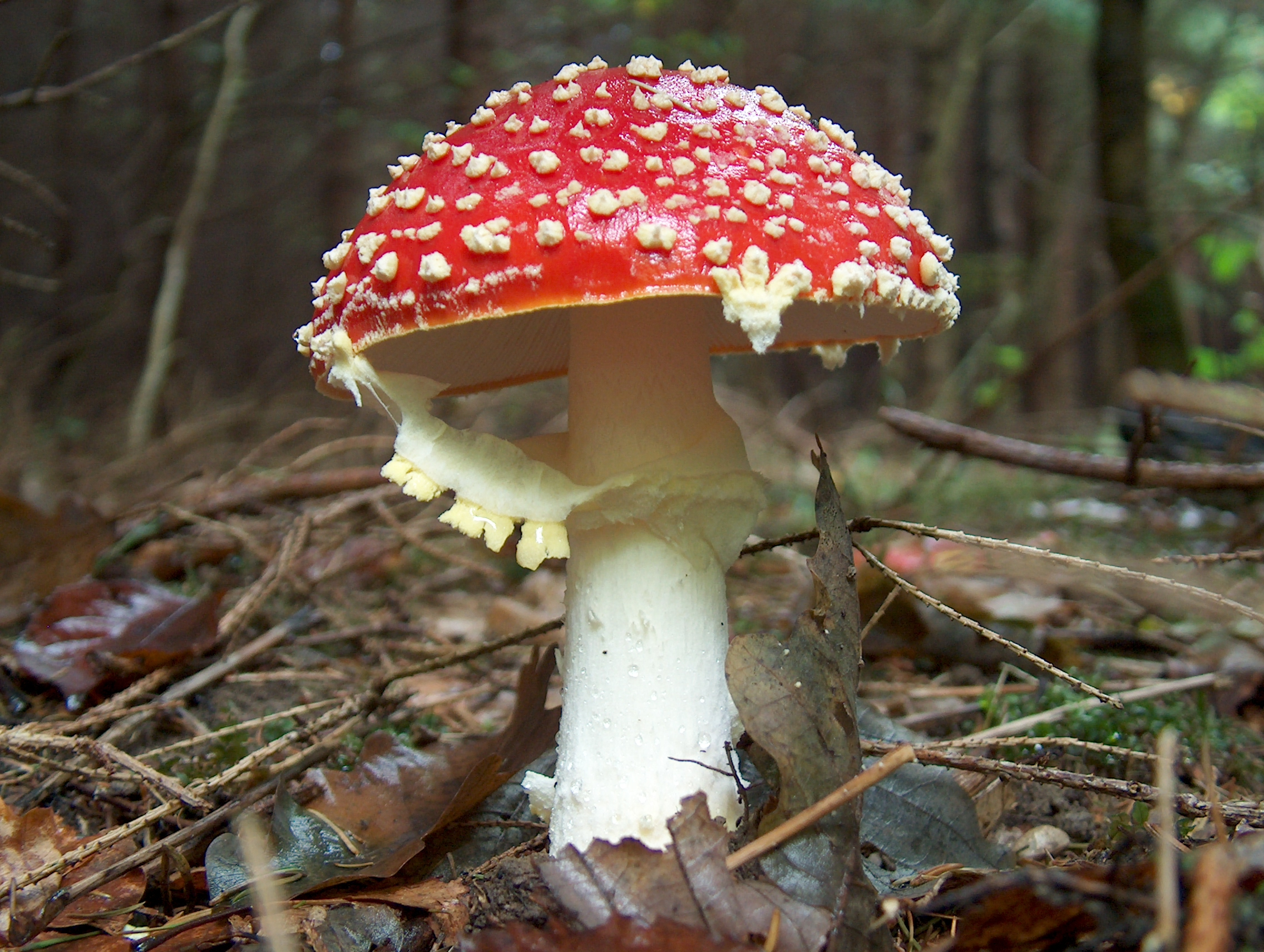 Fliegenpilz (Amanita muscaria)